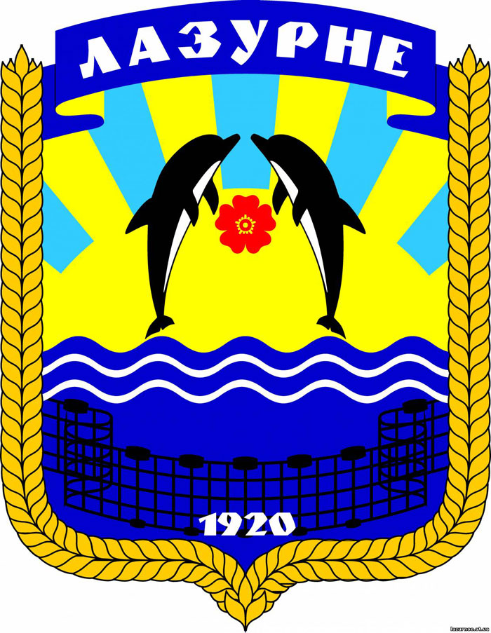 Герб Лазурного